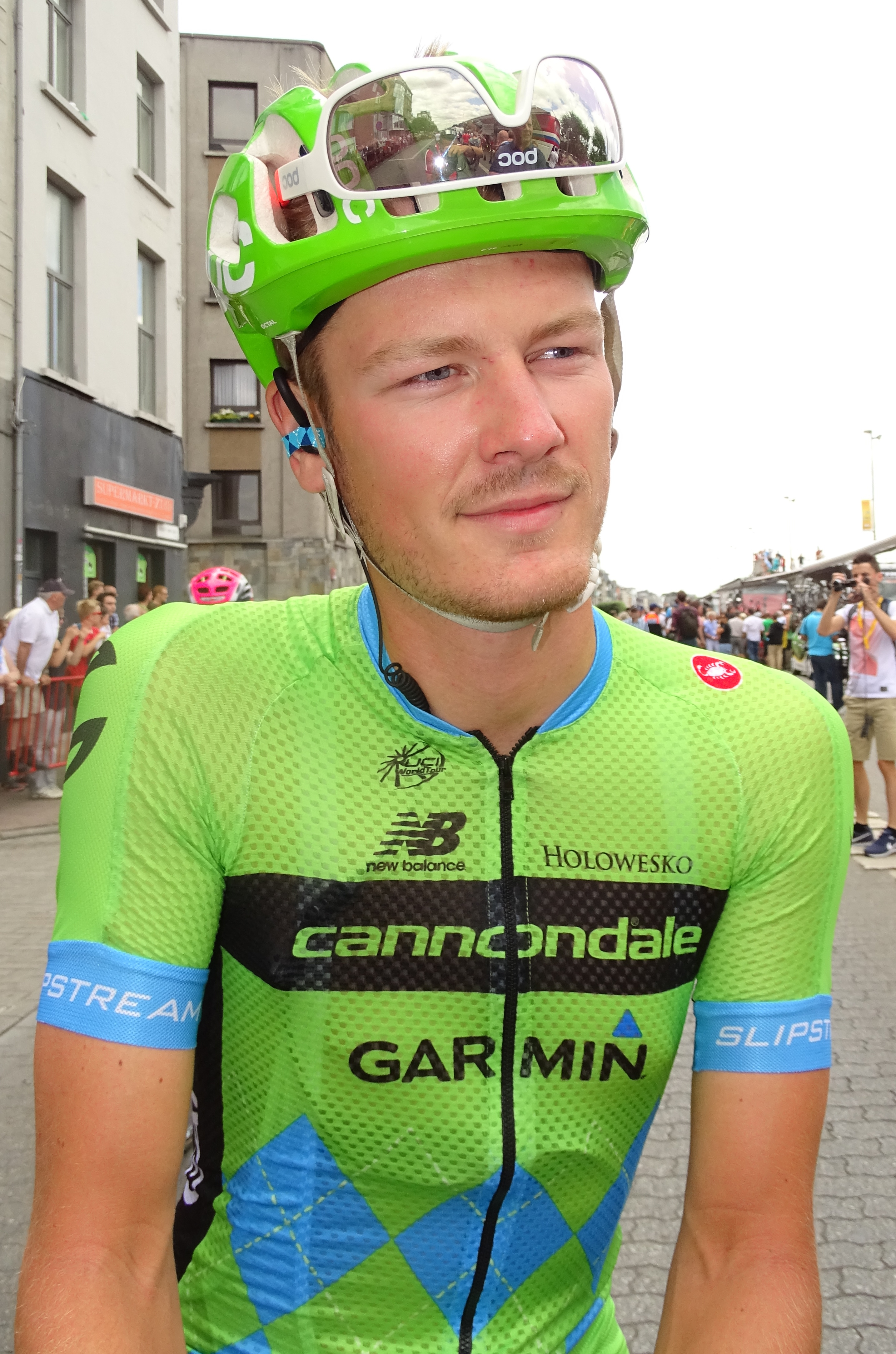 Reportage réalisé le lundi 6 juillet à l'occasion du départ de la troisième étape du Tour de France 2015 à Anvers, Belgique.